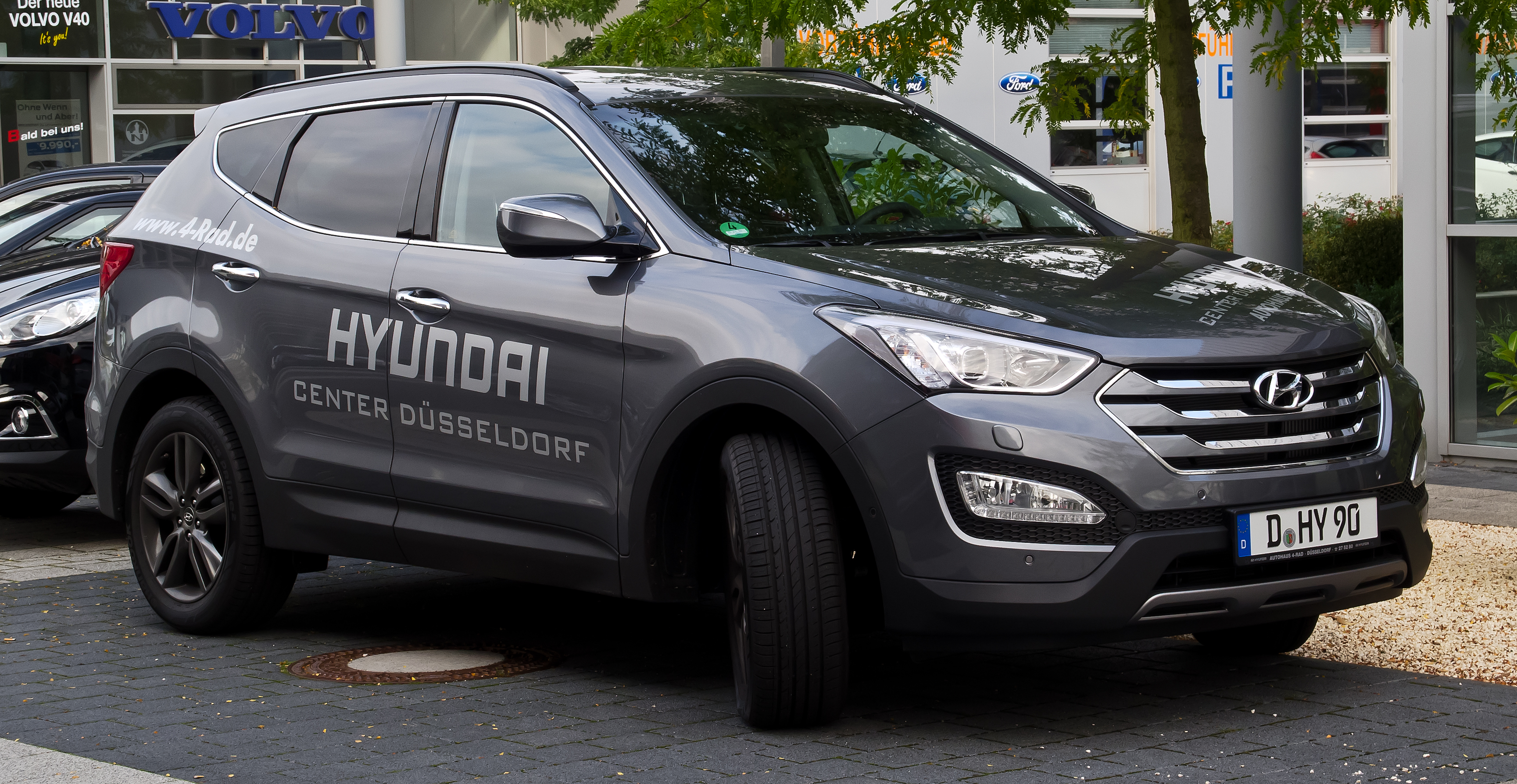 Hyundai Santa Fe 2.2 CRDi 4WD Premium (III)